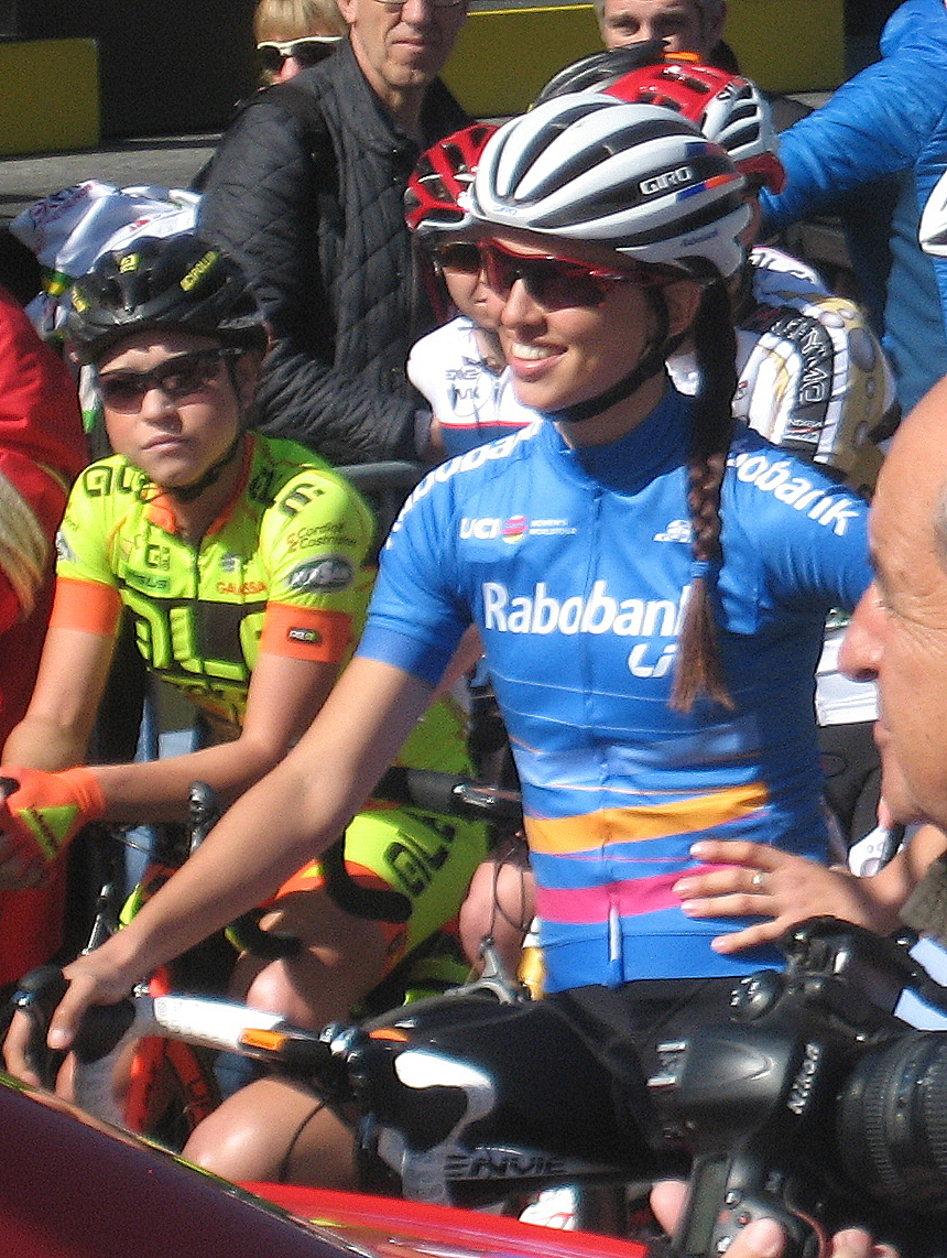 Katarzyna Niewiadoma (Rabo-Liv) aan start Waalse Pijl 2016